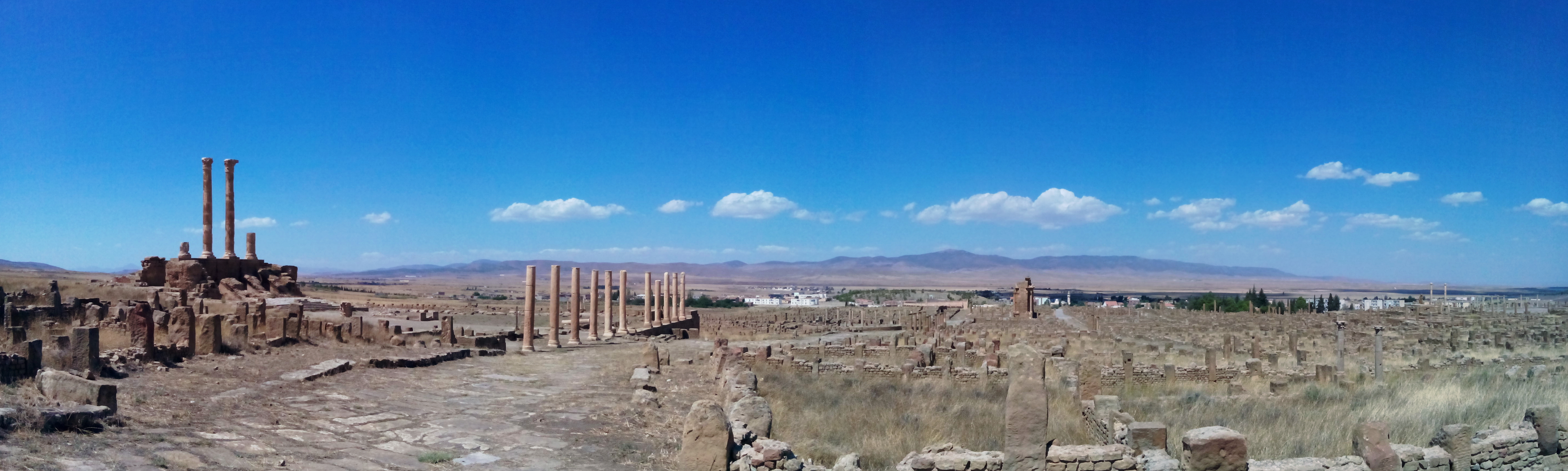 Territoires et monuments de l'antique Thamugadi.